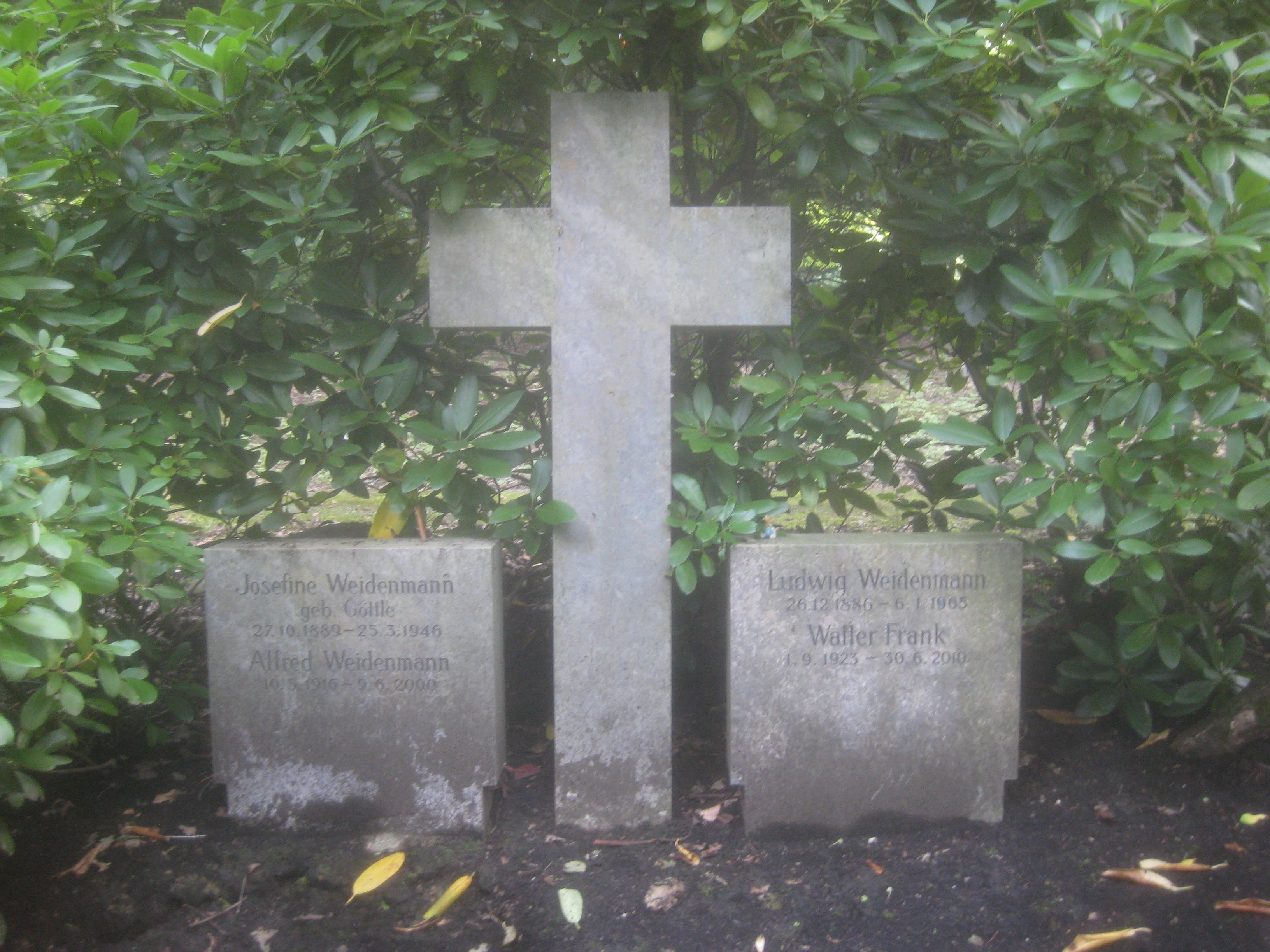 Grab von Alfred Weidenmann, Stuttgart, Waldfriedhof Stuttgart, Abteilung 30 b.